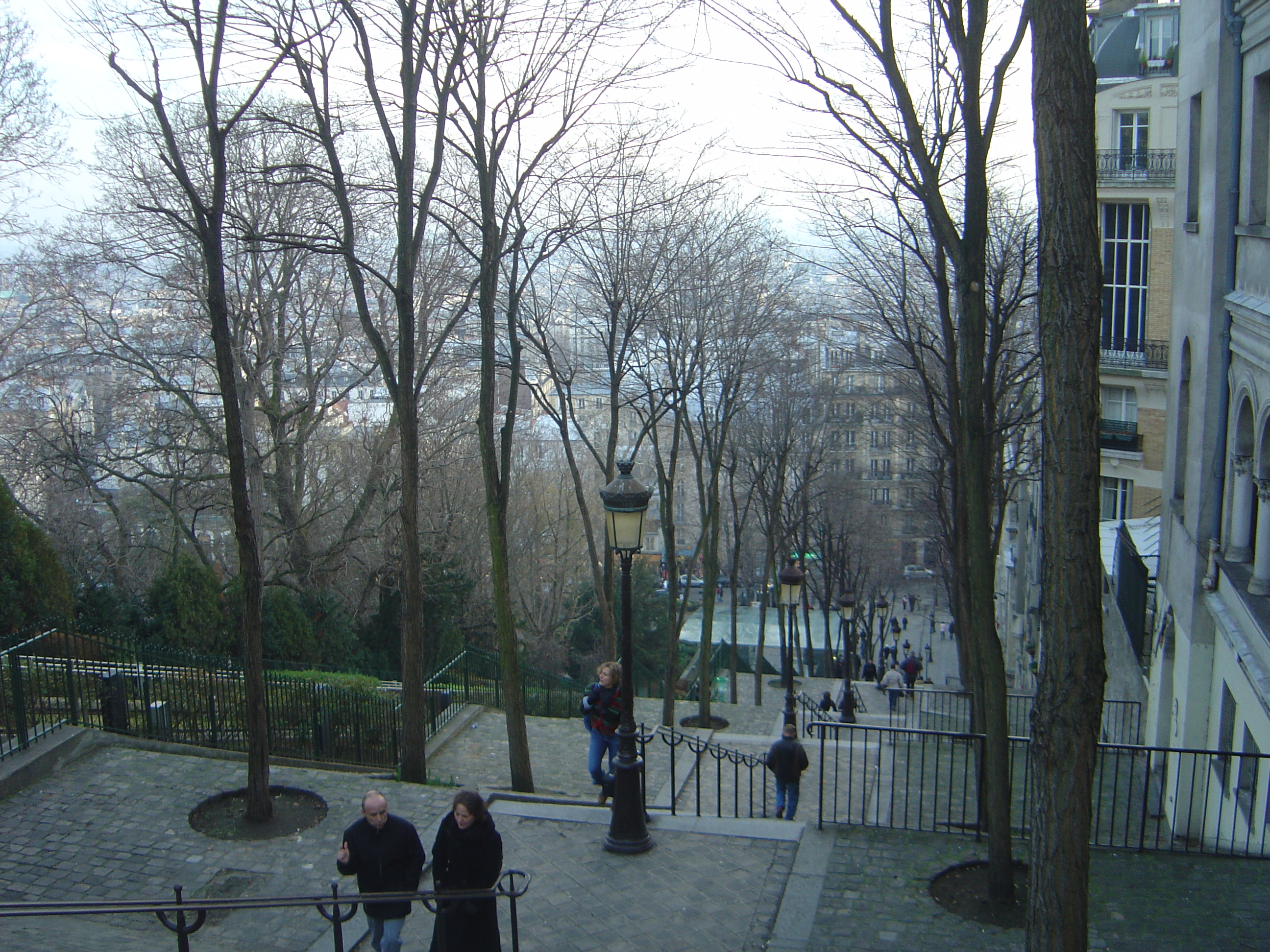 Paris, Montmartre, Escaliers près du funiculaire